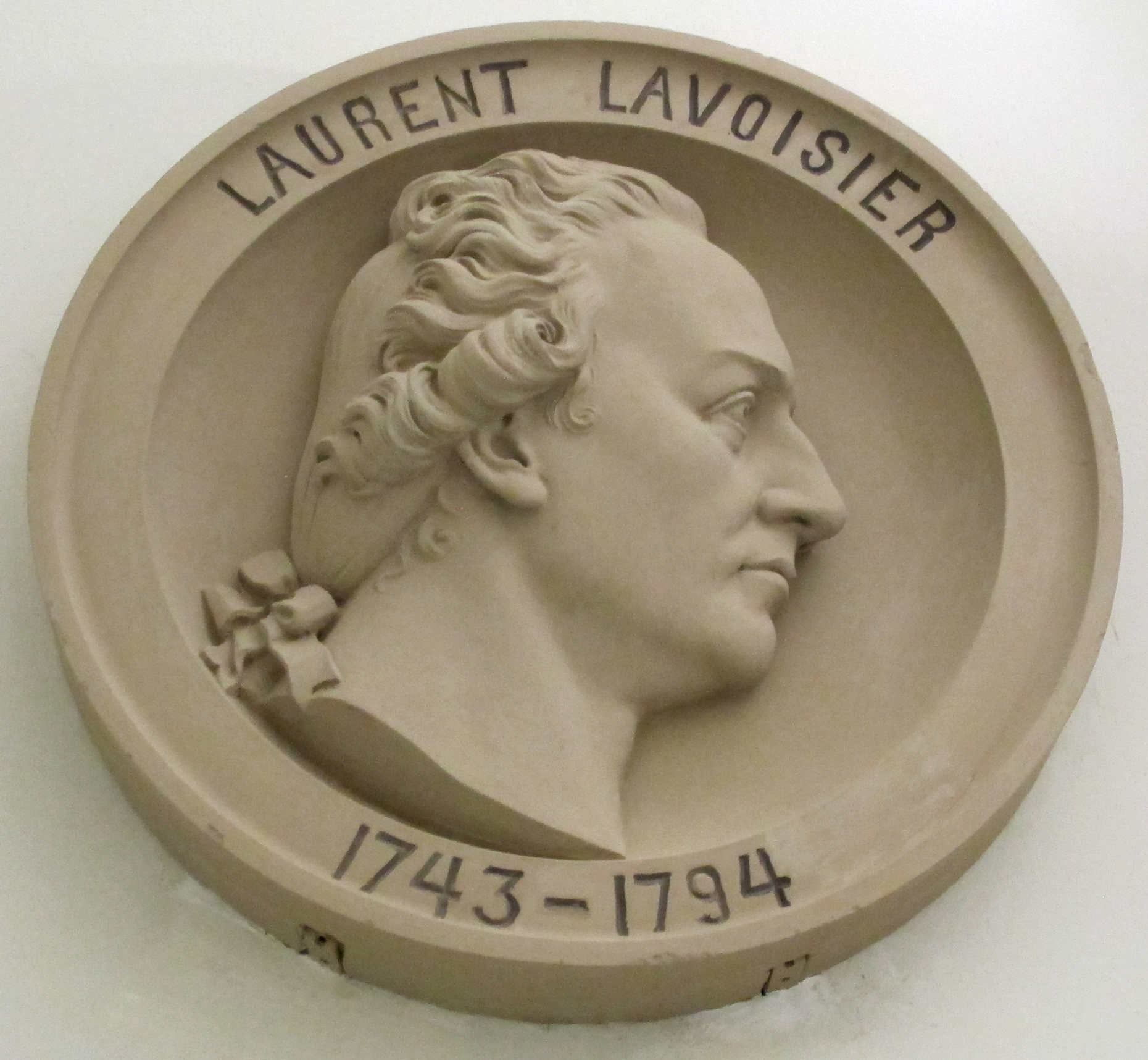 Firenze